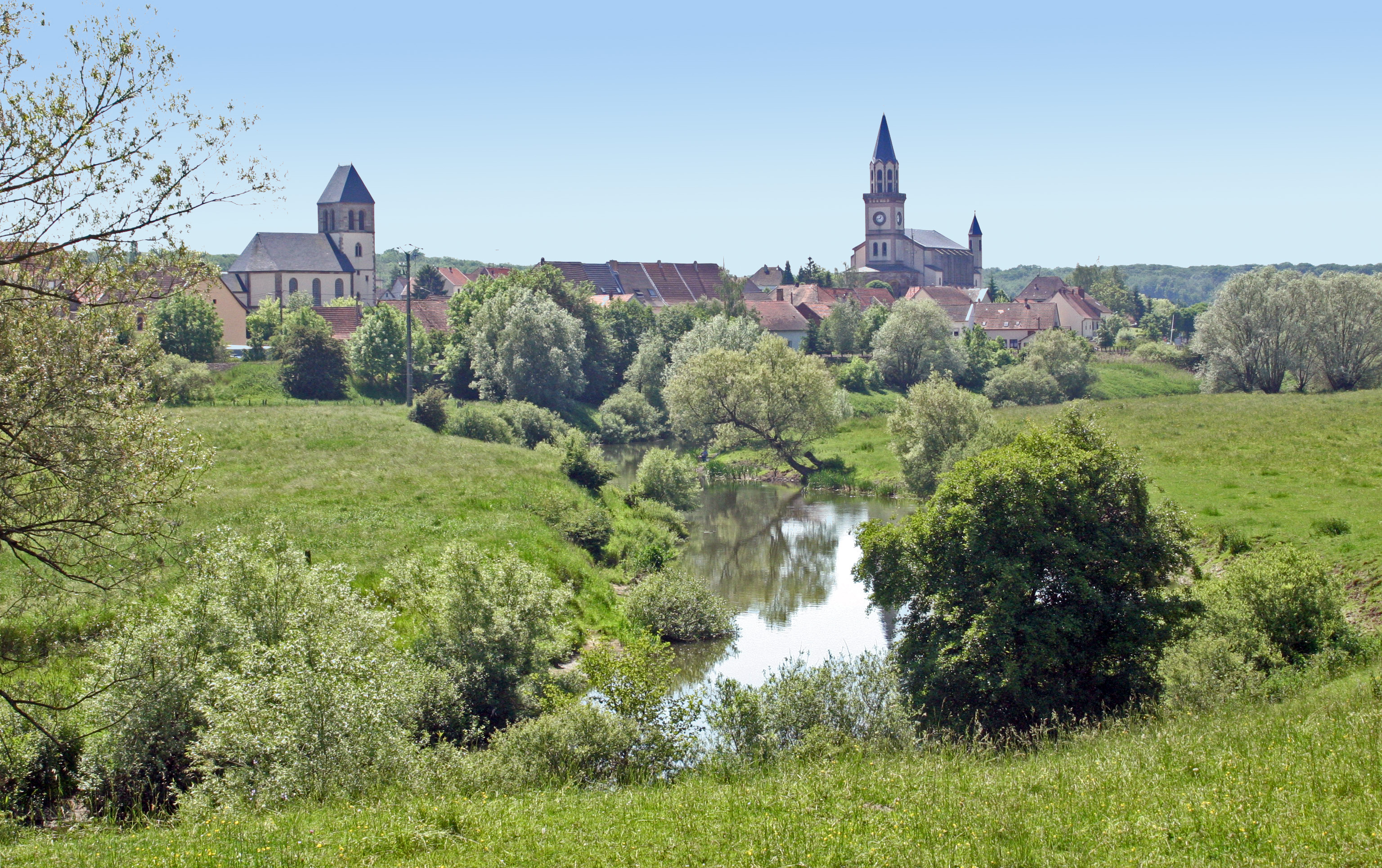 Herbitzheim